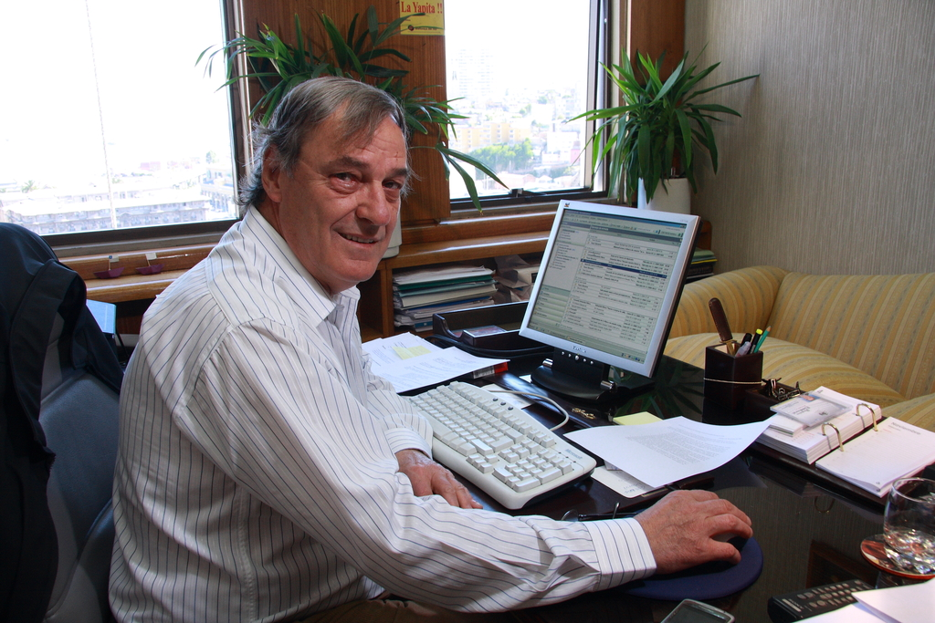 Roberto Delmastro Naso, político chileno.